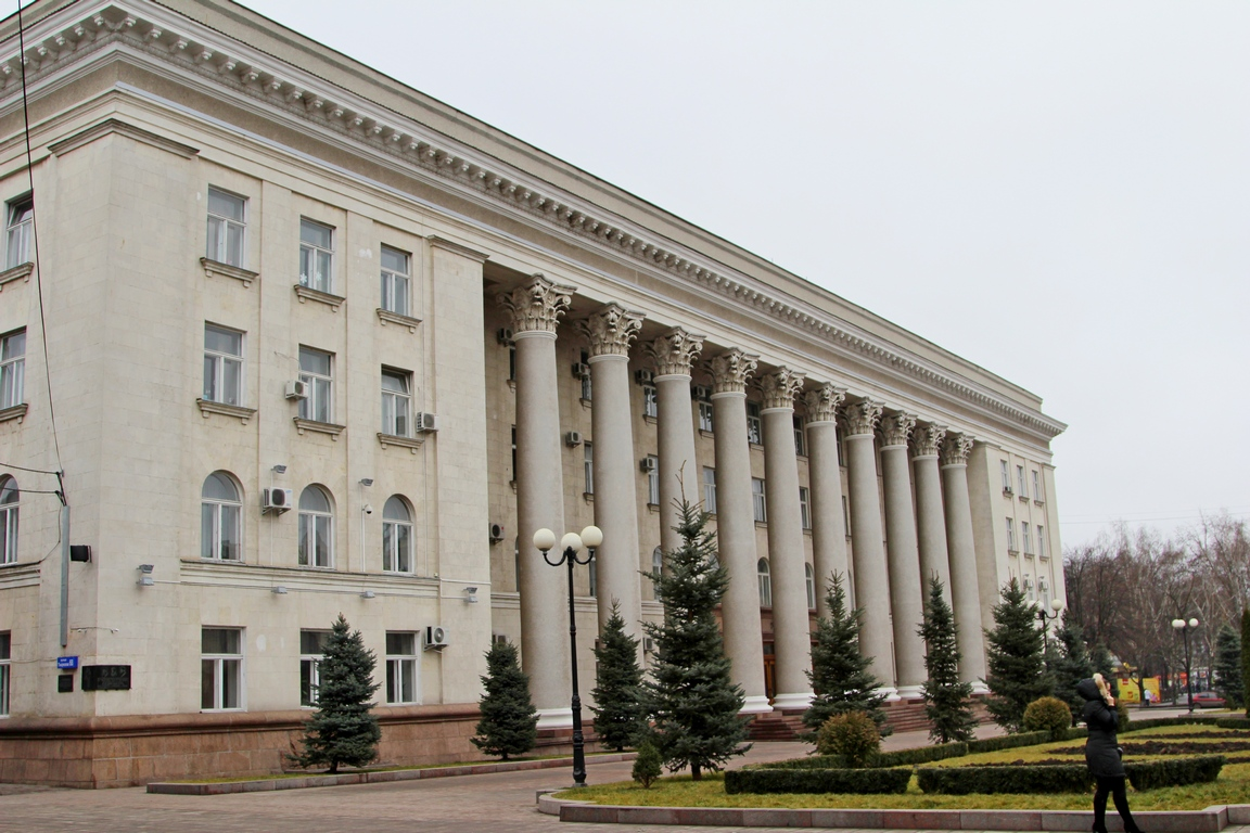 Будівля Кіровоградської міської ради